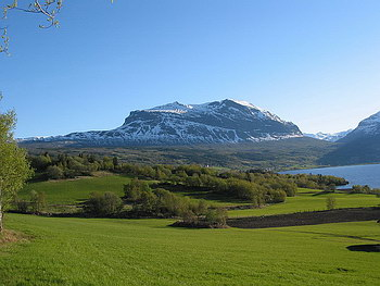 Vang i Valdres, ei fjellbygd vest i Oppland. I bakgrunnen Grindafjellet